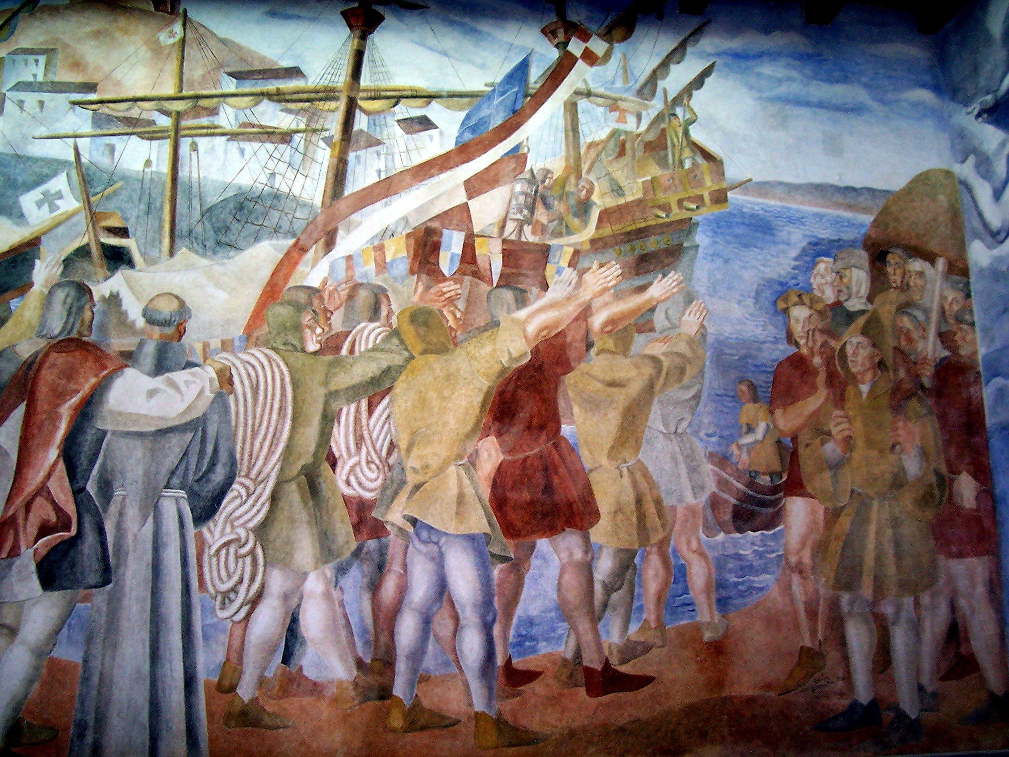 Trozo de los frescos pintados por Daniel Vázquez Díaz, en 1930, en el Monasterio de La Rábida Huelva